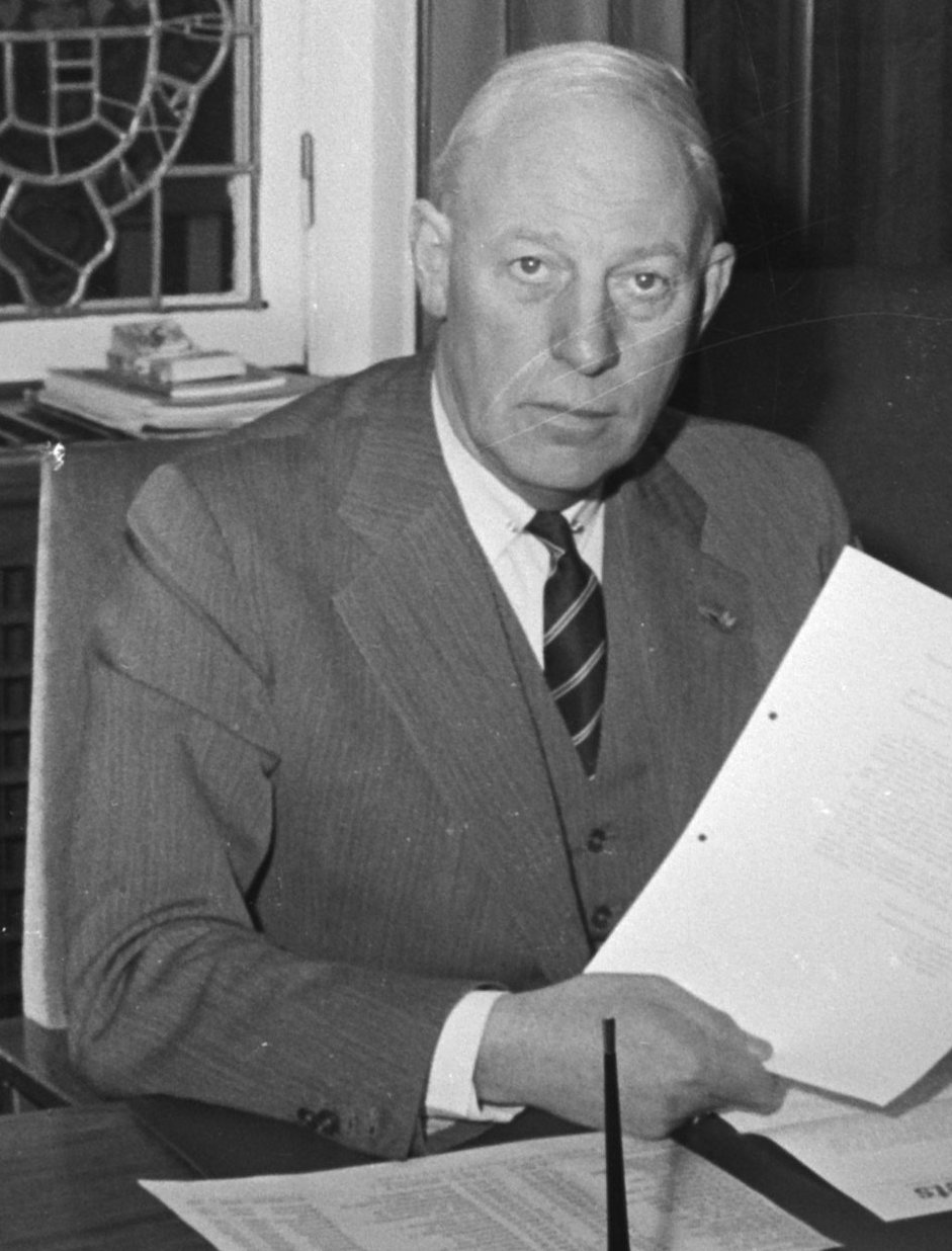 Pseudeo-vogelpest onder kippen, Barneveld; burgemeester K. van Diepeningen van Barneveld met telegram dat gezond is naar minister